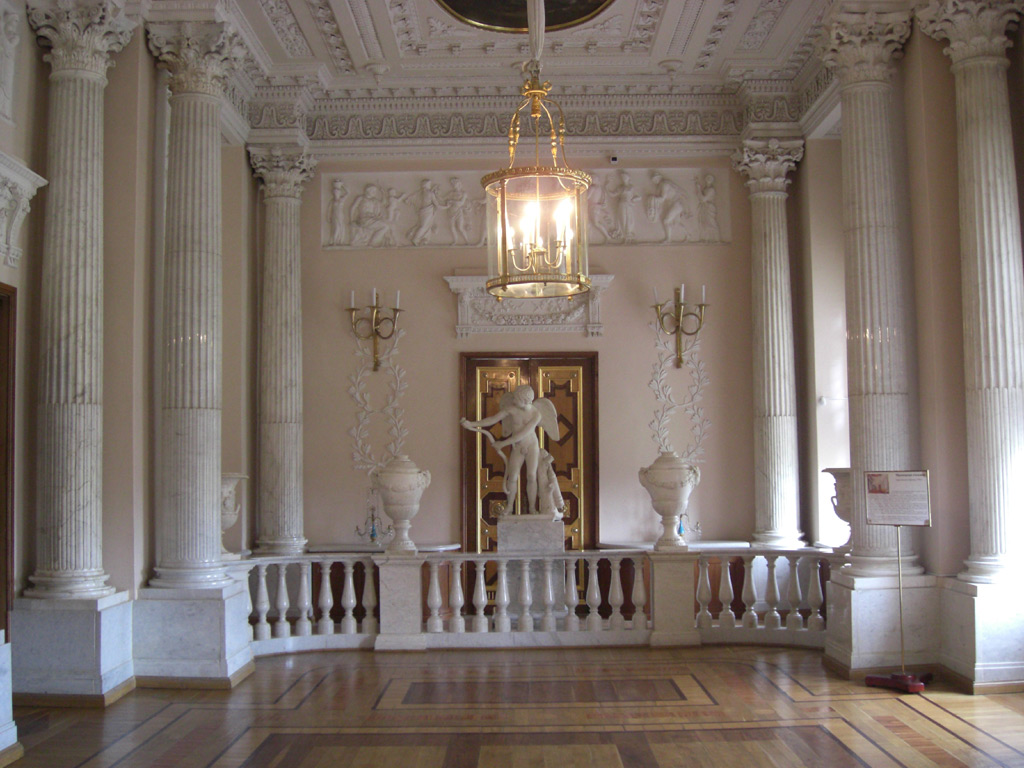 Мраморная столовая в Большом Гатчинском дворце